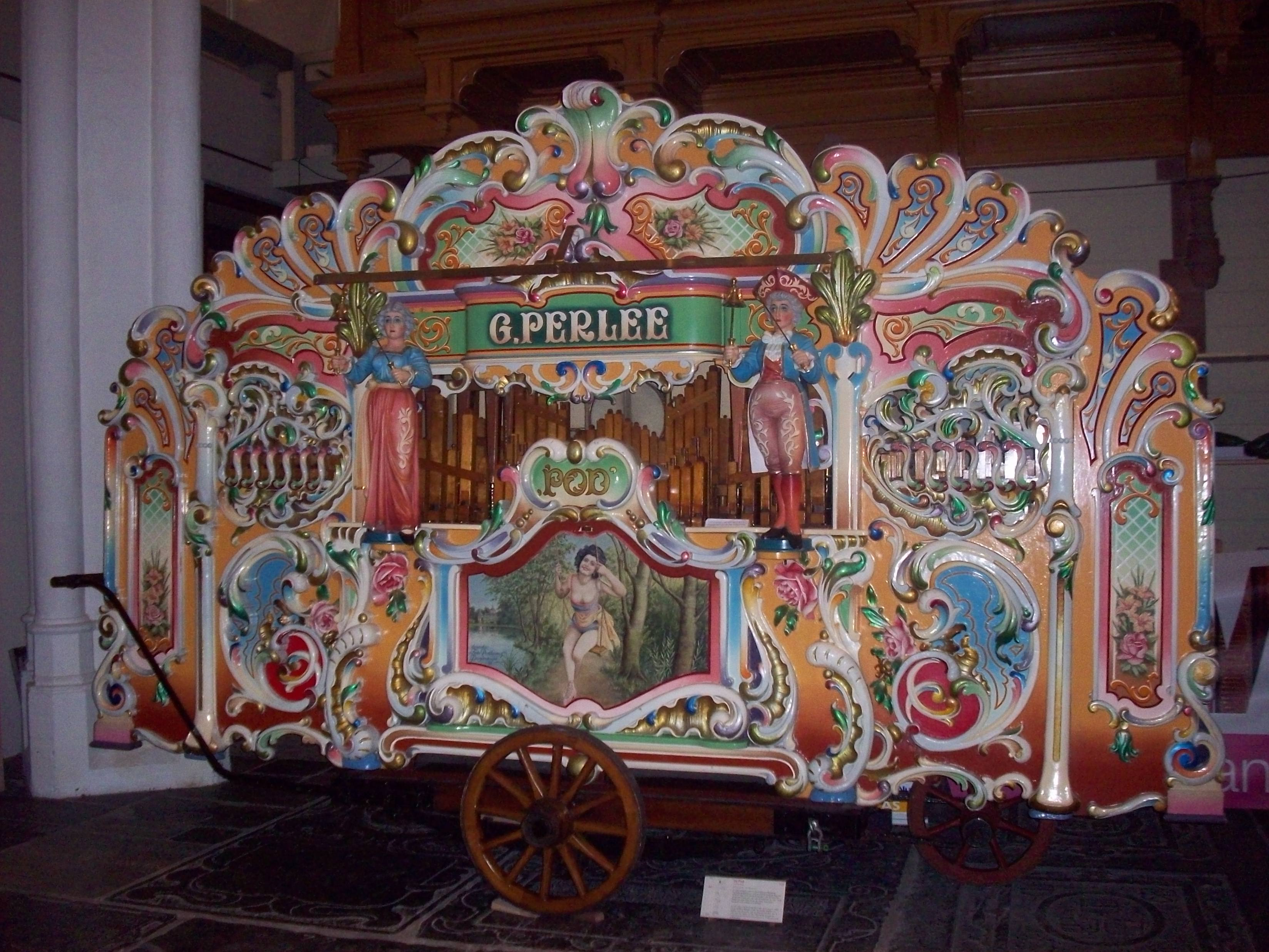 Draaiorgel de Pod in Museum Speelklok te Utrecht, Nederland